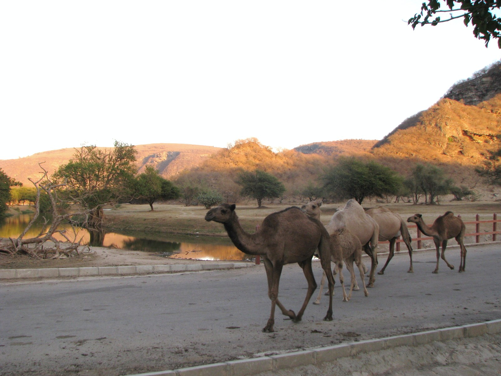 Hills and camels, Salalah, Oman